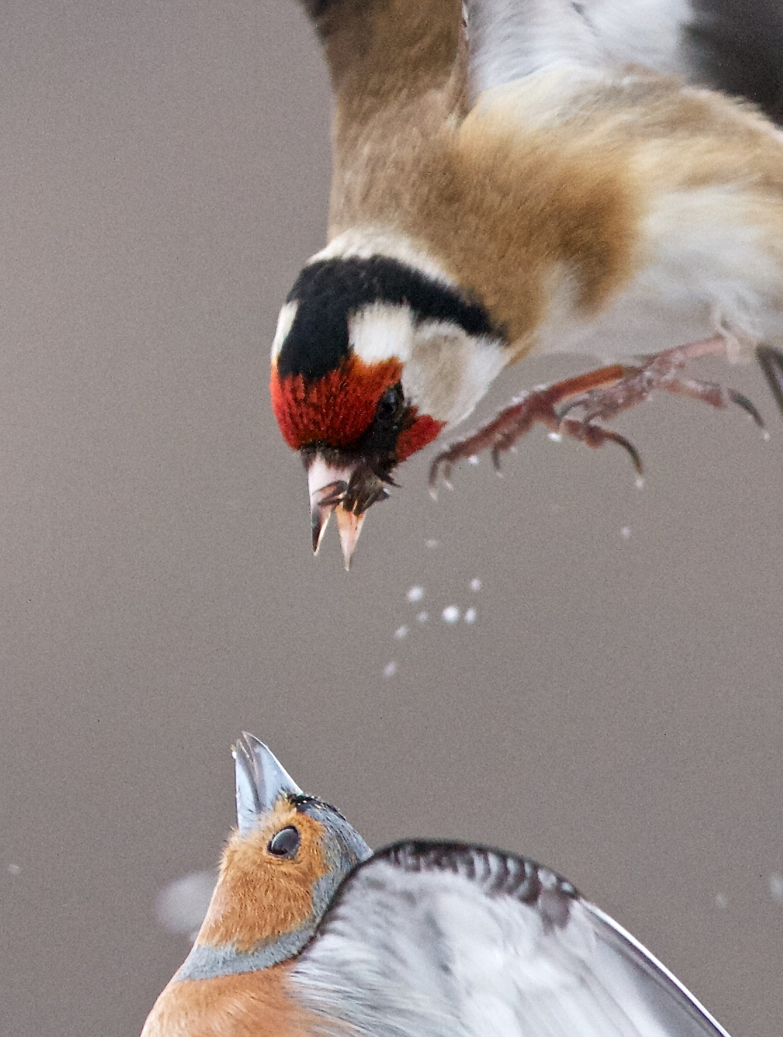 Glenfeshie